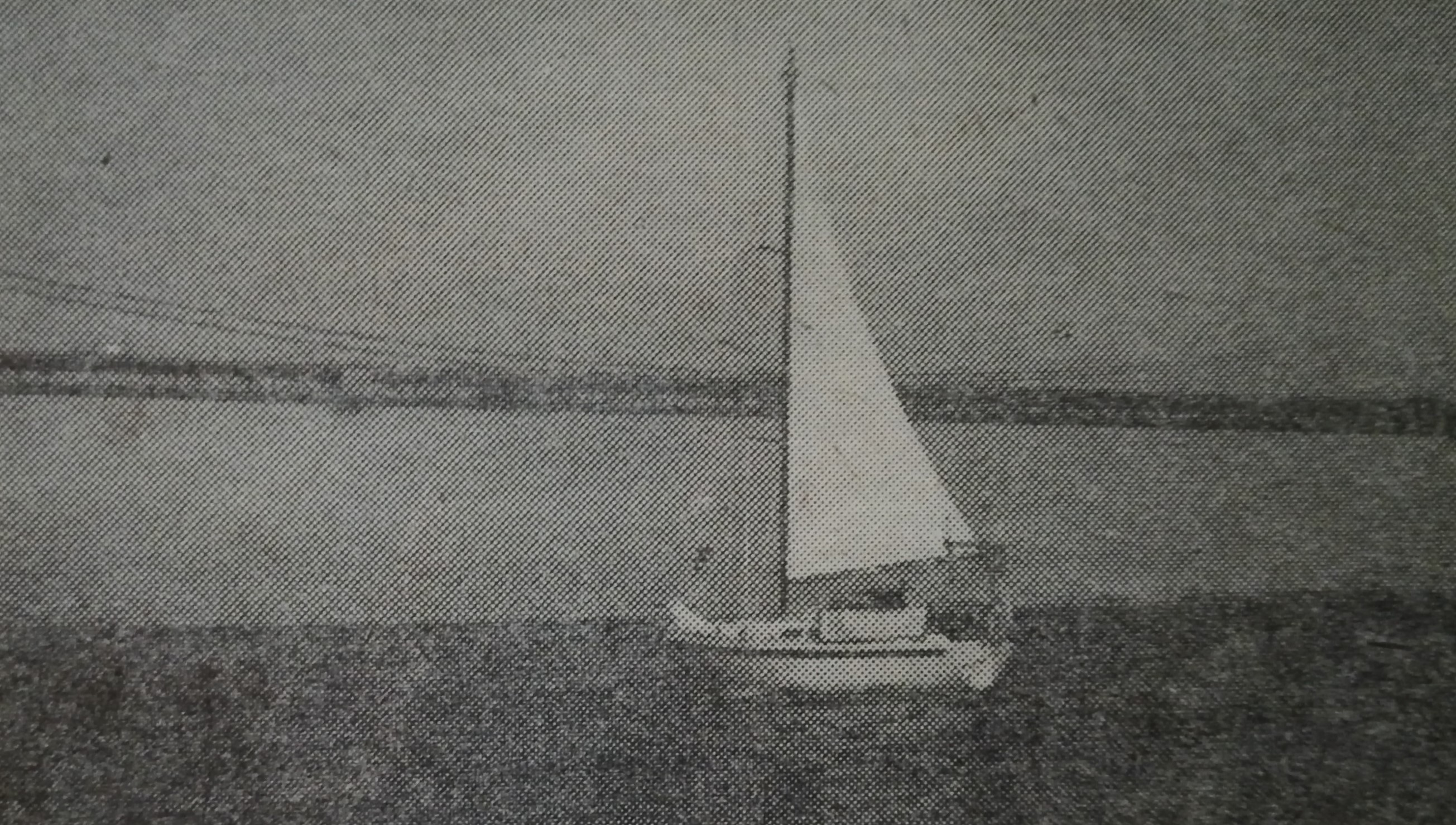 Polski jacht Nord IV pod Golden Gate. 1984 r.